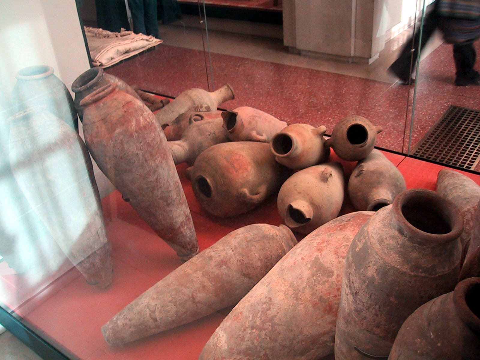 Amphores à vin. Époque thinite. Prov. Abydos.